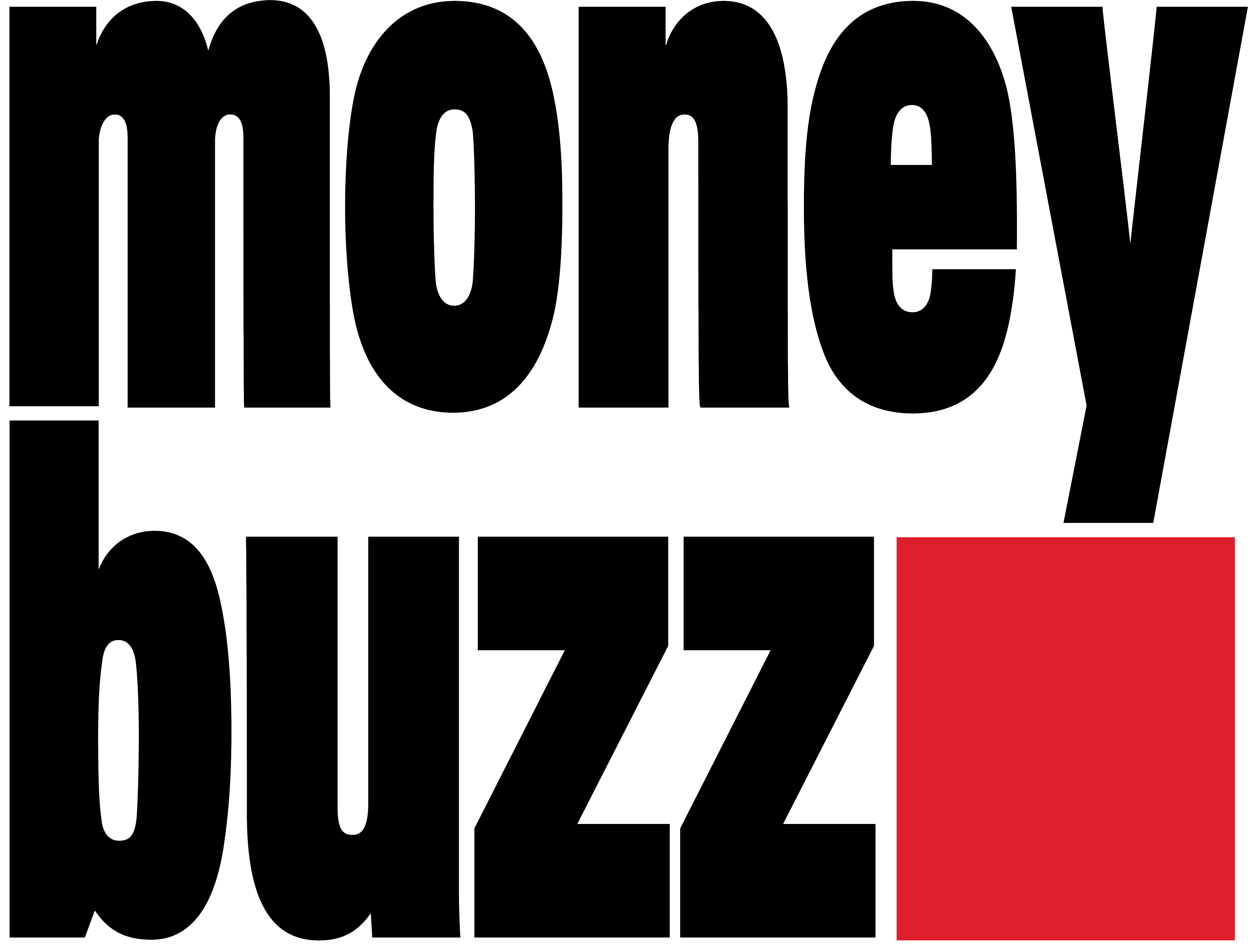 Logo Money Buzz!